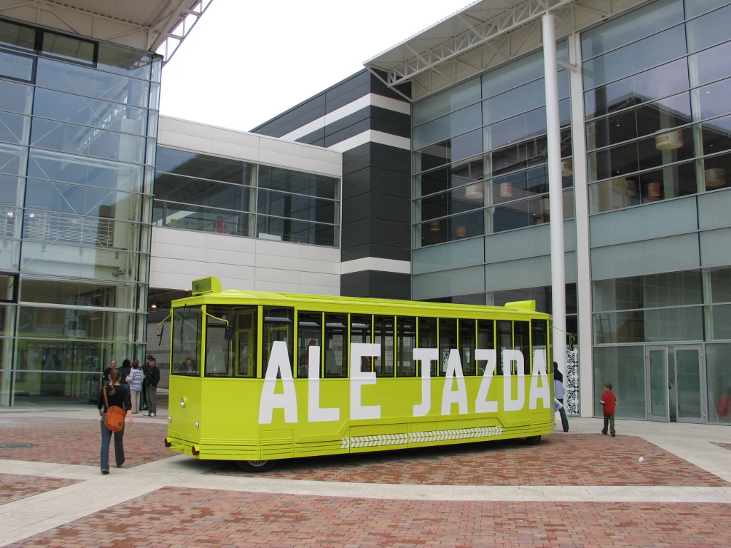 Centrum Manufaktura